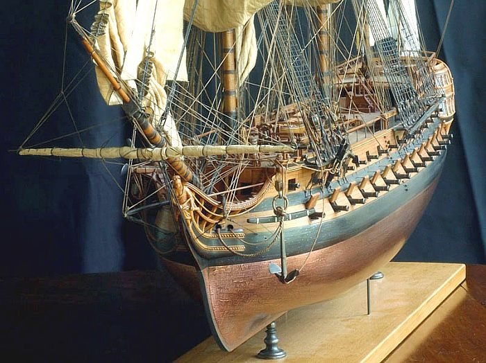 74 canons - 1780 - échelle 1/72ème - type de navire avec coque doublée au cuivre - par Jacques FICHANT